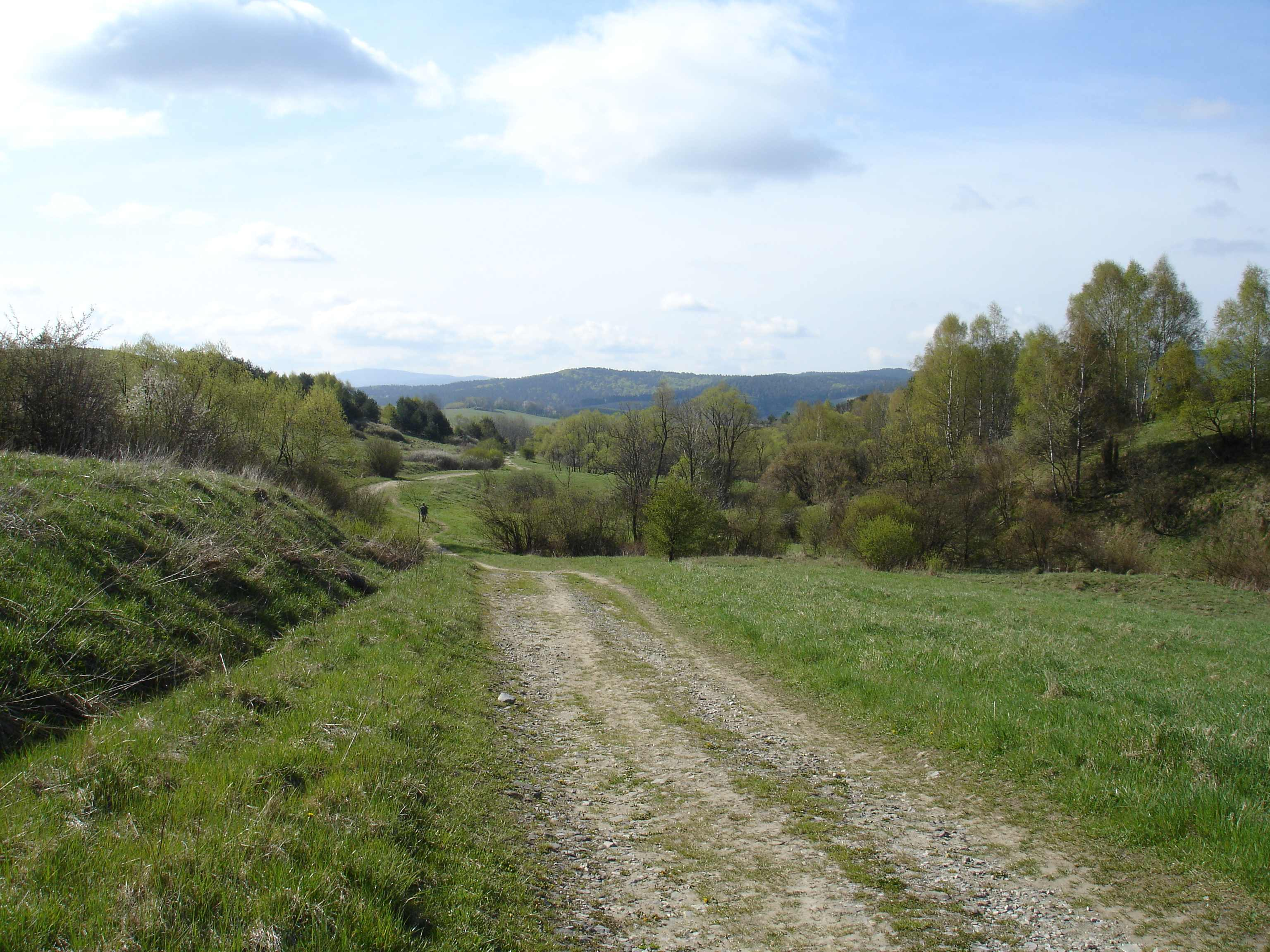 village Kamienne